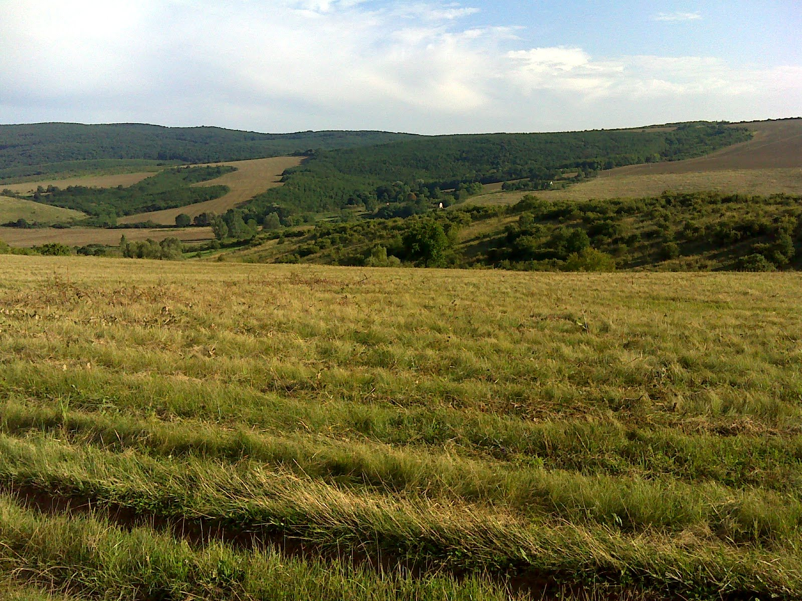 Romhány, Hungary